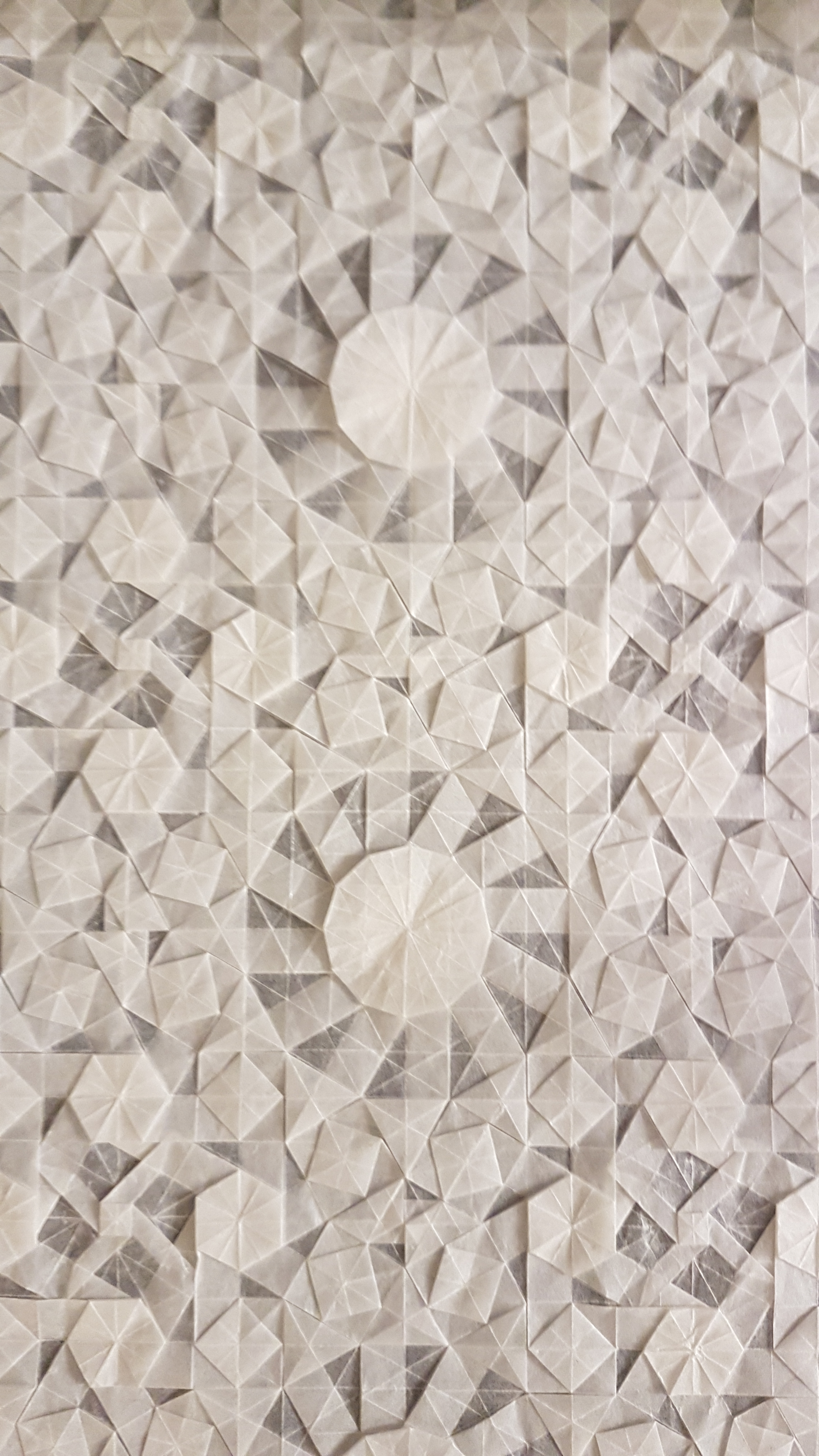 טסליישן- נוצר וקופל ע"י רונין שולץ, גרמניה